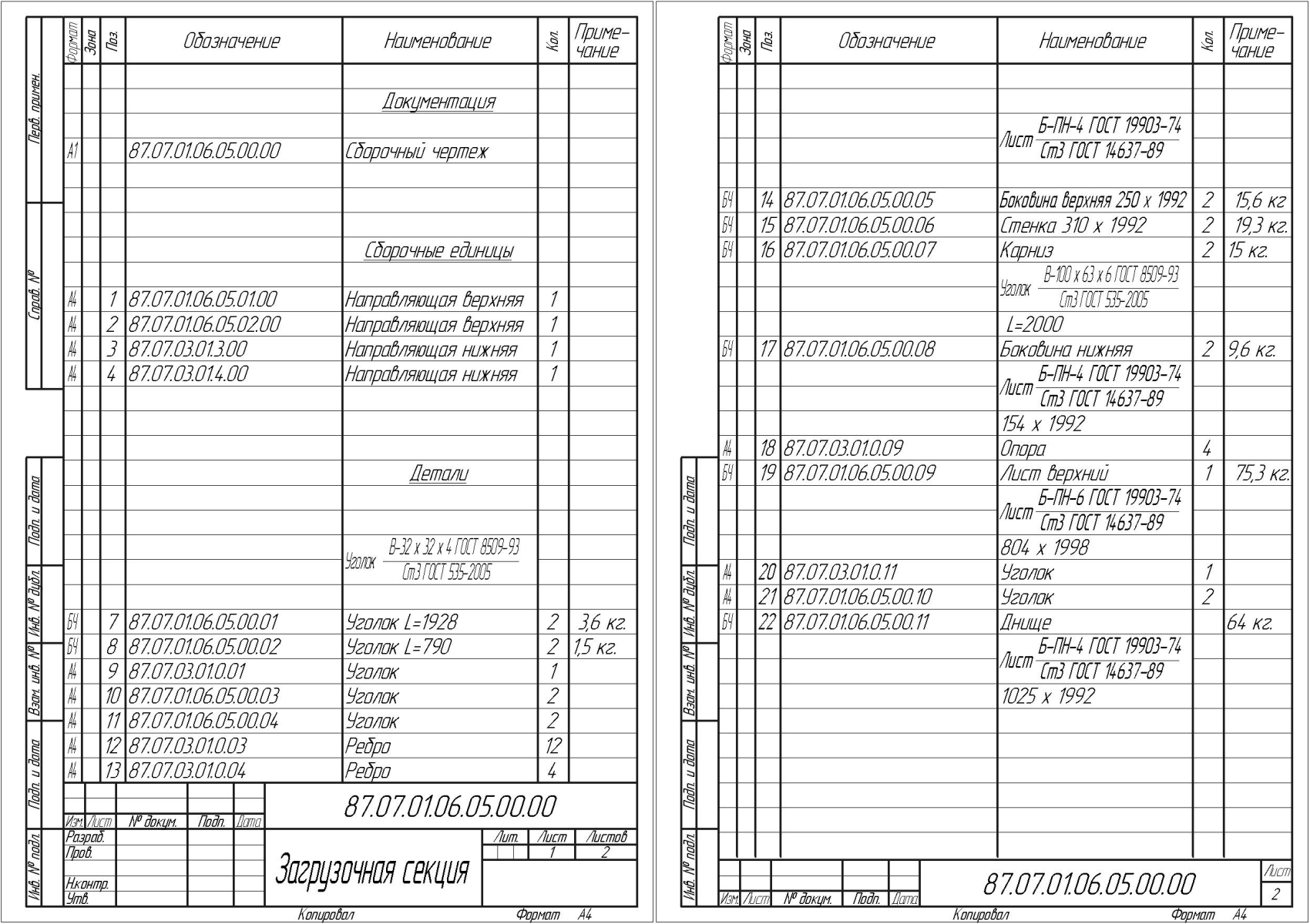 Спецификация – документ, определяющий состав сборочной единицы.